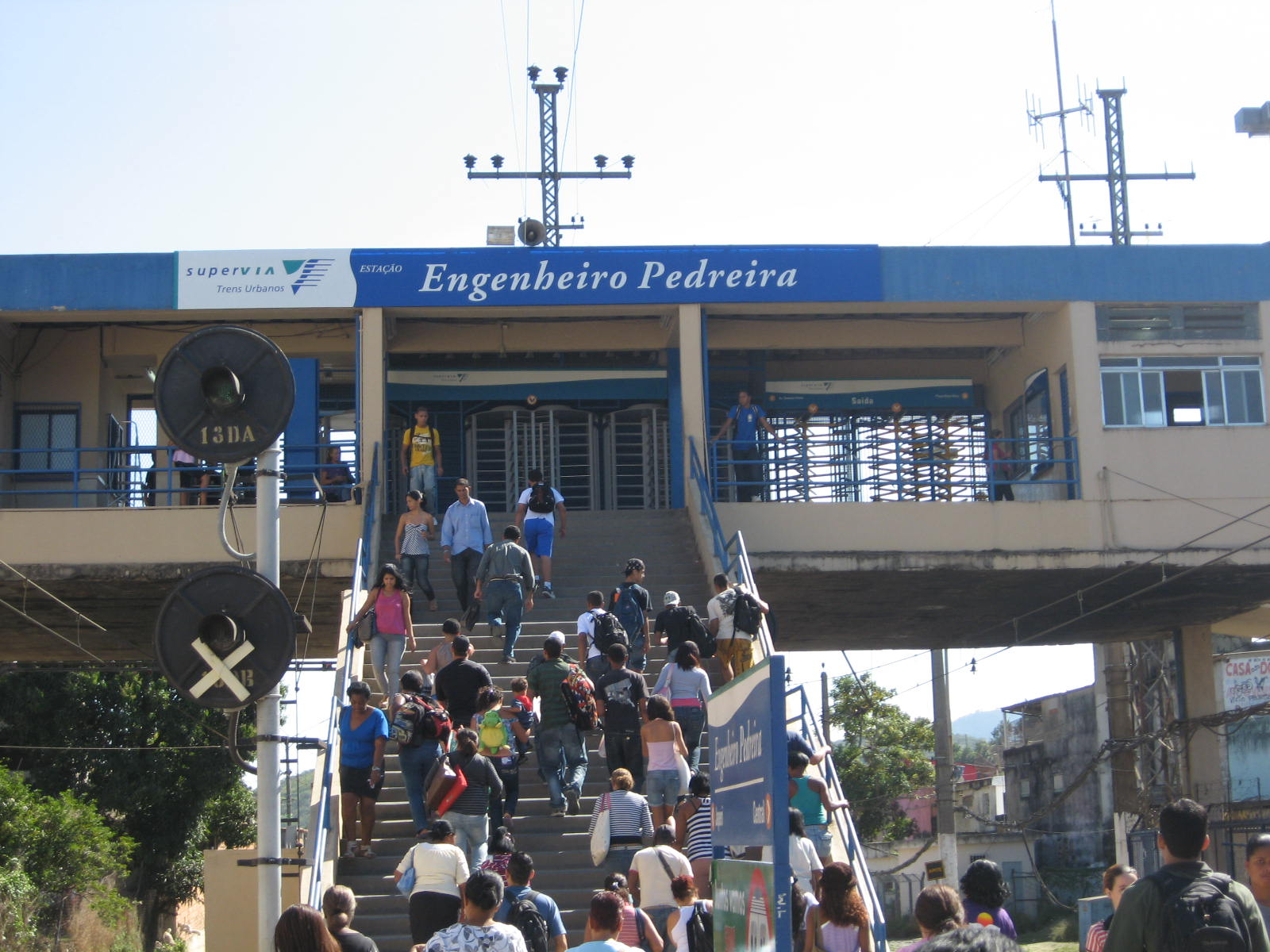 Vista da estação ferroviária de Engenheiro Pedreira, em Japeri, RJ.